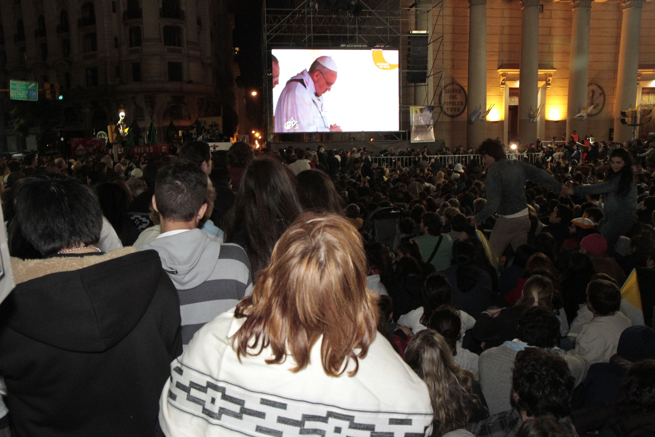 Buenos Aires, 19 de Marzo de 2013. La multitud de fieles sigue atentamente la Santa Misa que se celebre en Roma como inicio del Pontificado de Francisco Fotos: sandra hernandez-mariana sapriza/GCBA